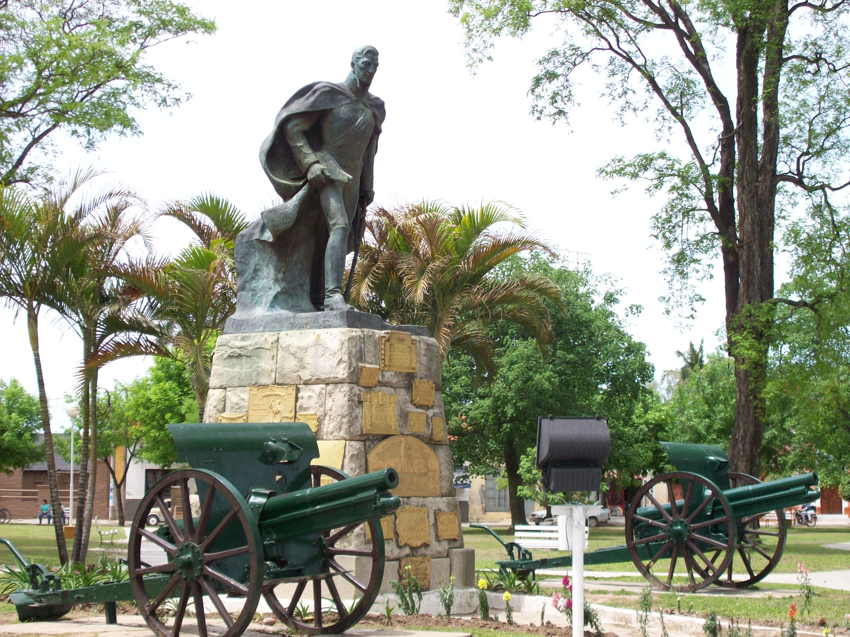 Monumento del General San Martín en la plaza del mismo nombre en la ciudad de Goya, Corrientes, Argentina.